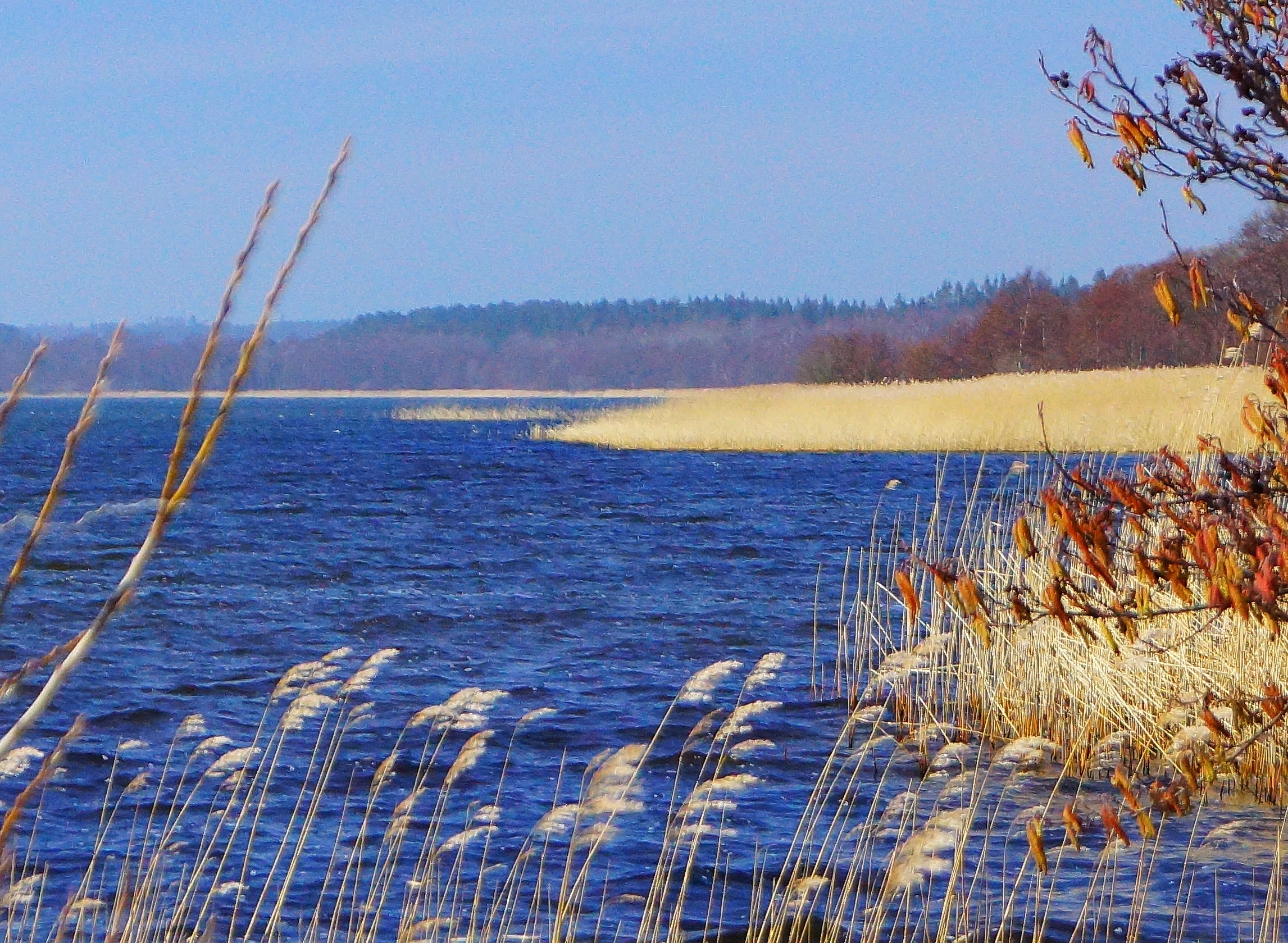 Stubbe sø fra Fuglereservat